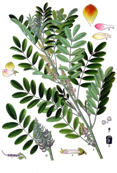 Indigofera anil. A Blütenzweig. B Traube mit reifen Hülsen. 1 Blüte; 2 Fahne vom Rücken aus gesehen; 3 Flügel; 4 Kiel; 5 Kelch und Geschlechtsorgane; 6 Pollen; 7 Fruchtknoten; 8 reife Samen; 9 derselbe vergrössert. A, B, 8 in natürlicher Grösse, 1-7 und 9 vergrössert.